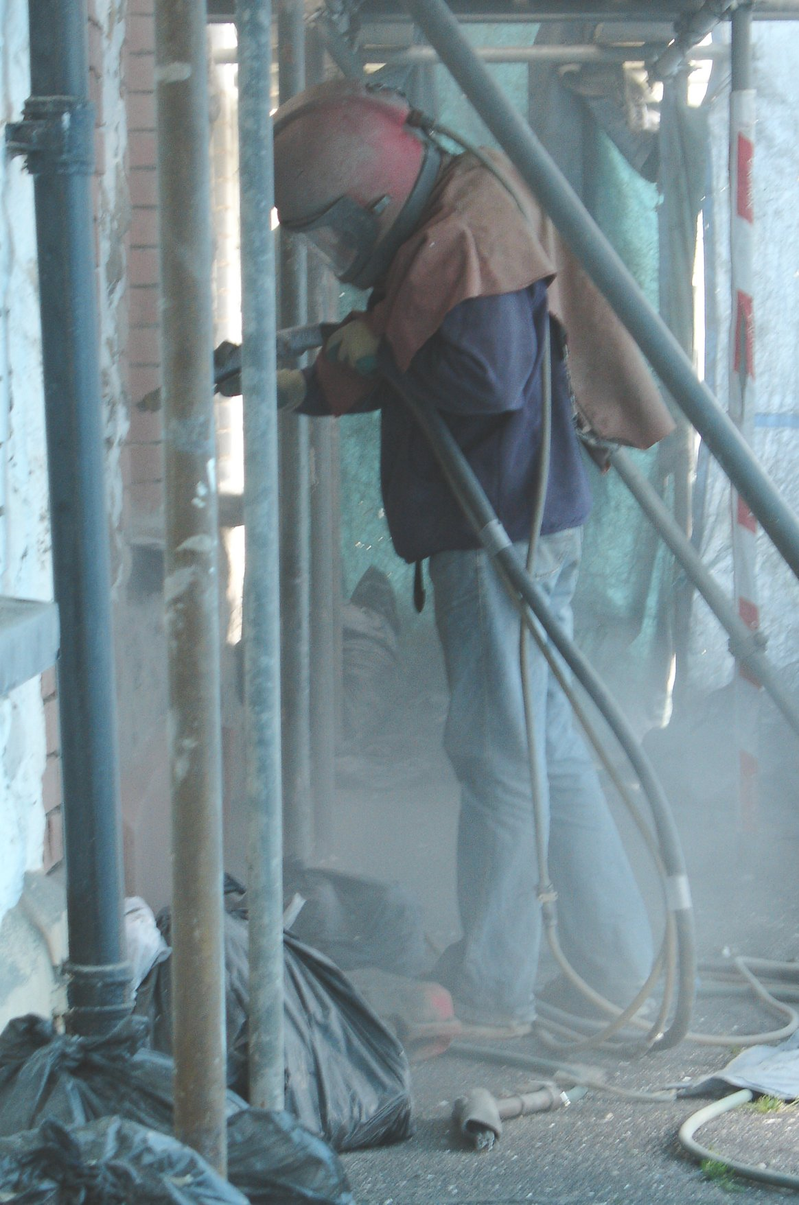 Jud sanblasting a stone wall.